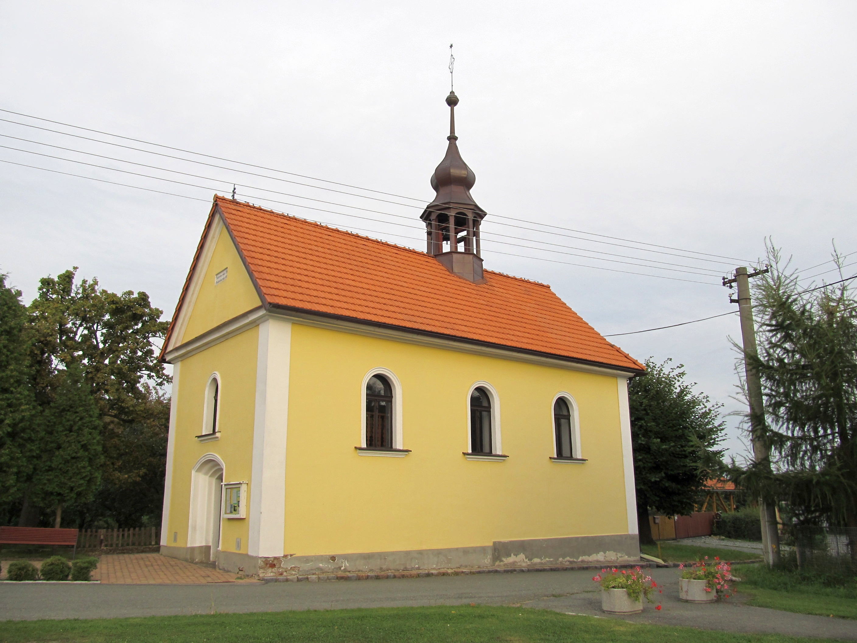 Kaple Panny Marie Sněžné (Žernov)